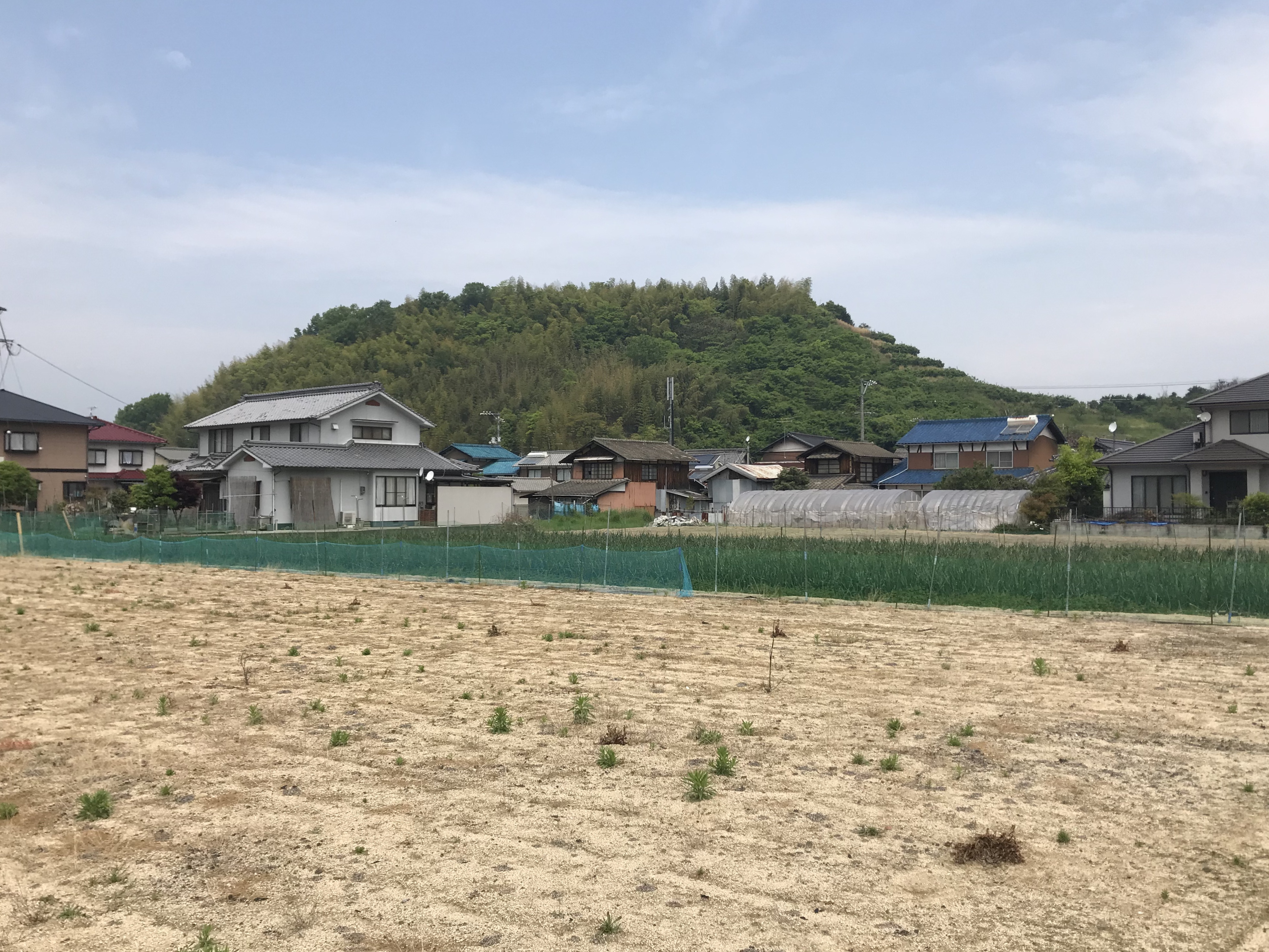 南側より望む青木城跡